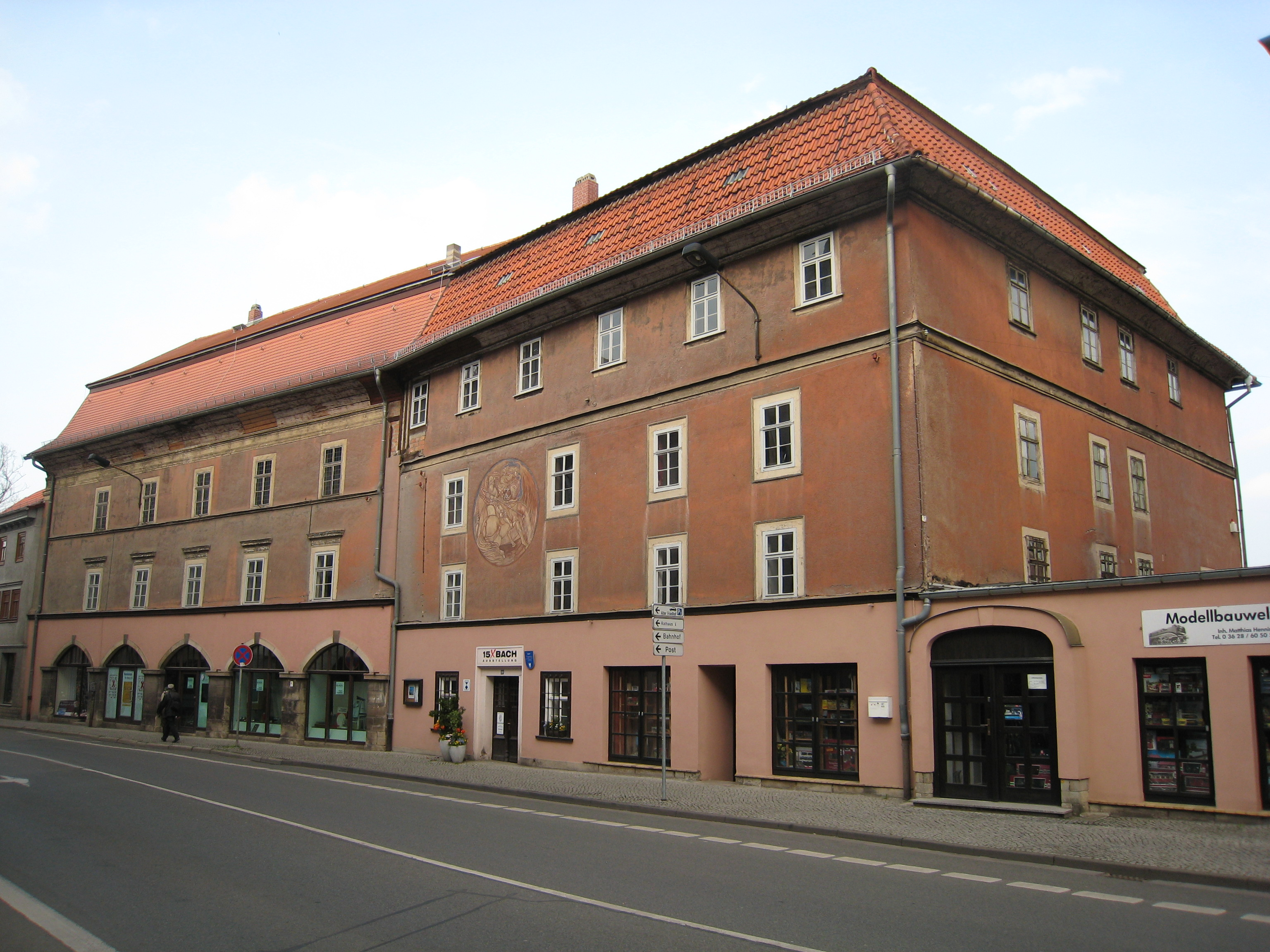 Iama hospitalo en Arnstadt.